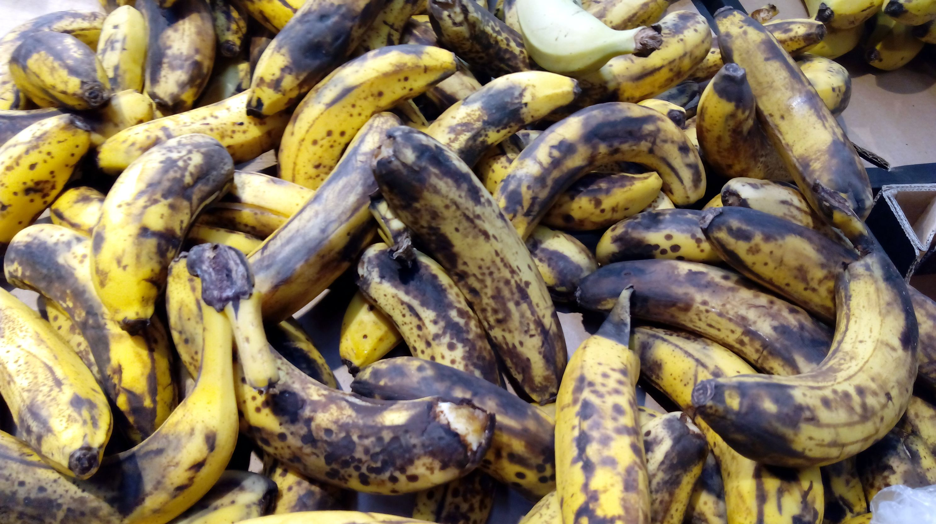 Гнілыя бананы